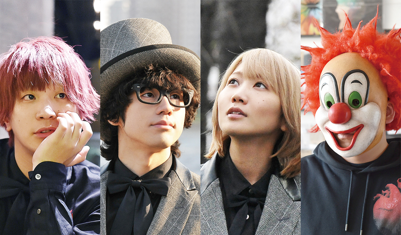 SEKAI NO OWARI。2015年撮影。